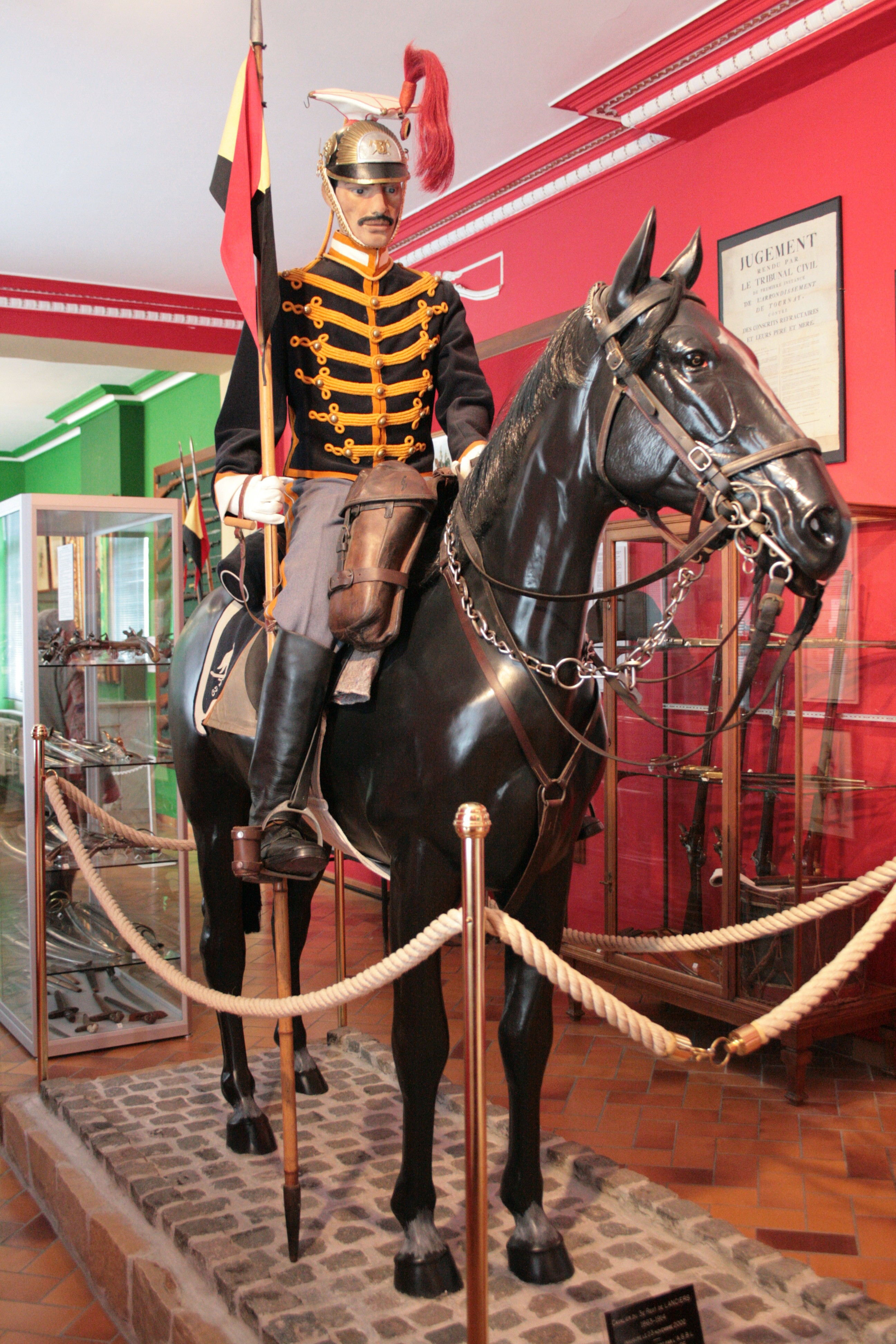 Musée d'Armes et d'Histoire militaire, rue Roc Saint-Nicaise 59-61, Tournai (Belgique). Uniforme de cavalier du 3e Régiment de lanciers (1883-1914)